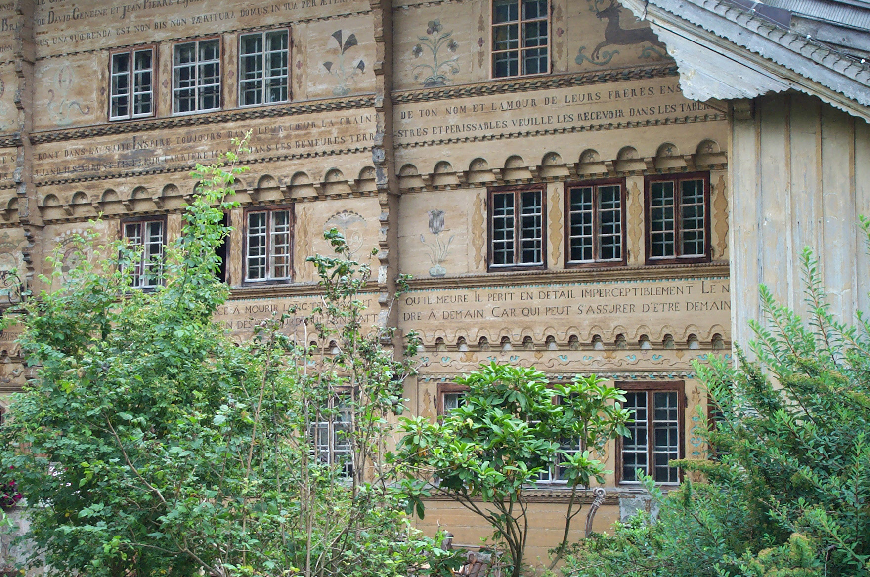 Chalet de Rossinière : inscriptions sur la façade avant